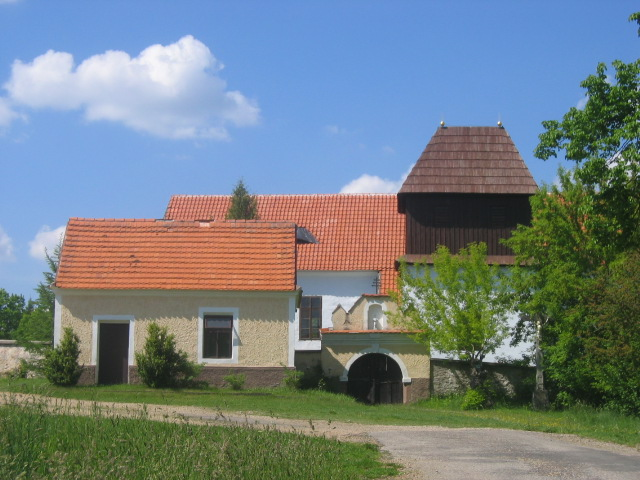 Preĝejo de Sankta Johano la Baptisto en vilaĝeto Chřešťovice, kun en Ĉeĥio nekutima ligna turo, en distrikto Písek, Sudbohemia regiono, Ĉeĥio